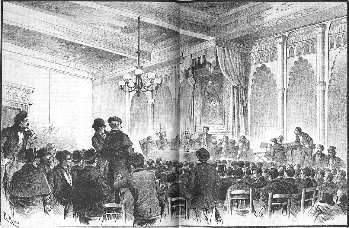 Vetllada en honor al marquès de Cerralbo. Aspecte del suntuós saló de sessions del Círcol Tradicionalista de Barcelona, en la nit del 15 de Febrer de 1890.